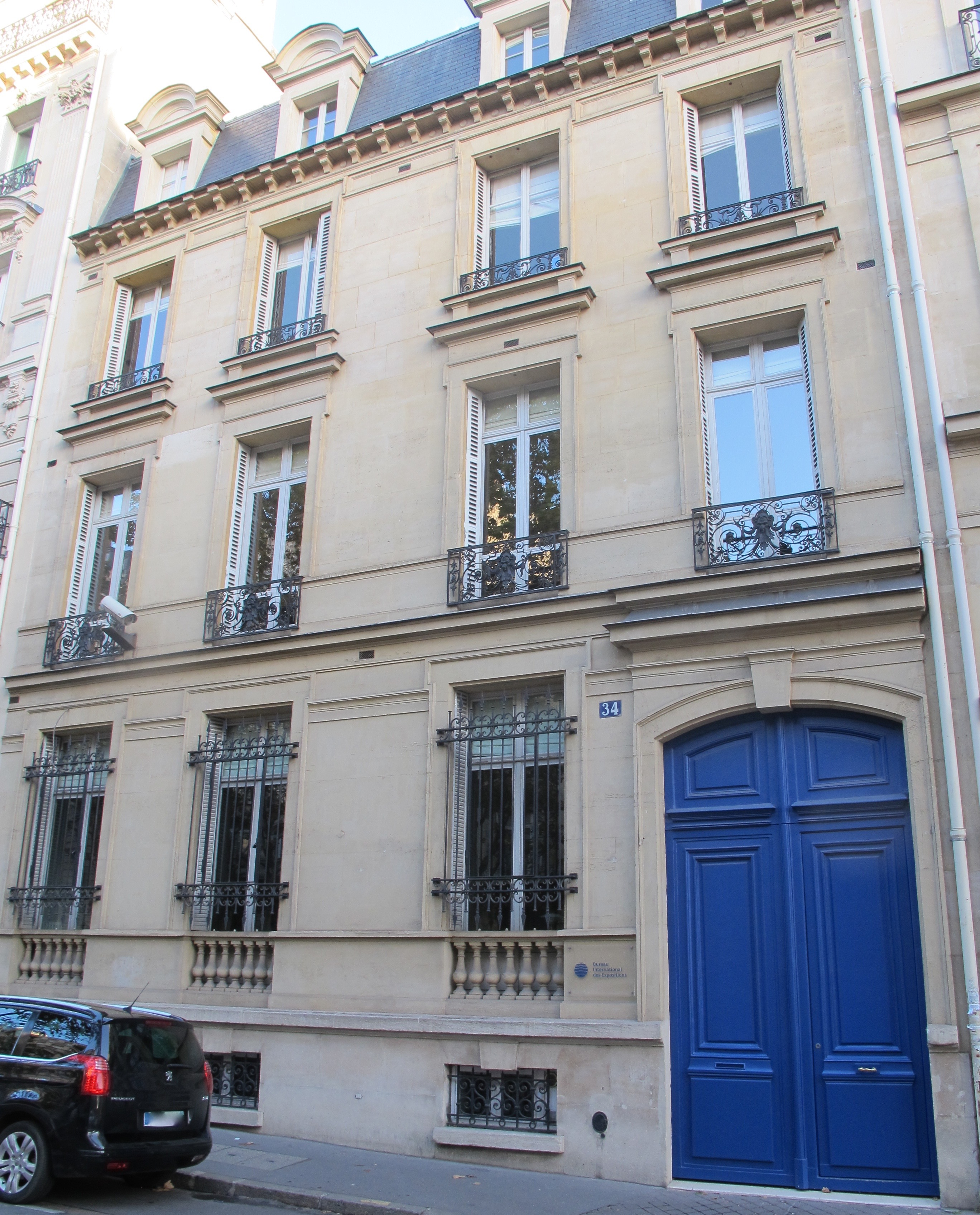 Siège du Bureau international des Expositions, 34 avenue d'Iéna (Paris, 16e).